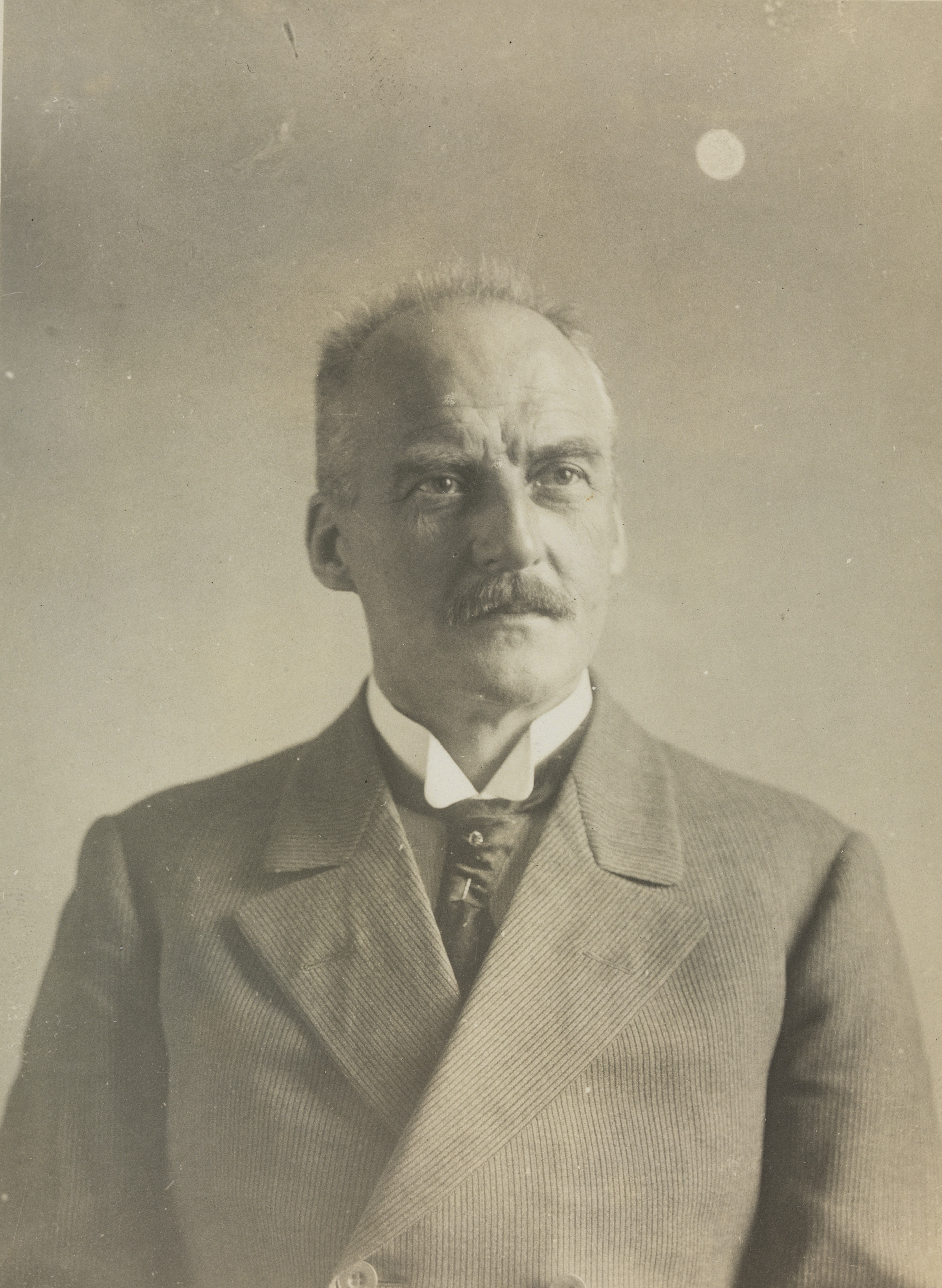 Sophus Carl Fredrik Torup. Depicted person: Torup, Sophus Carl Fredrik (1861-1937) Depicted place: Oslo